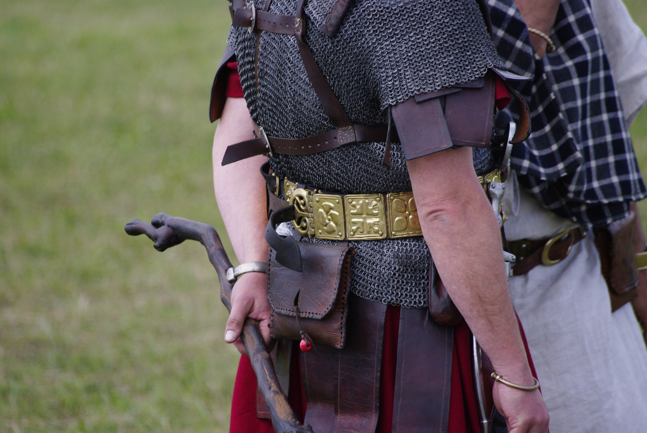 Détail de la partie arrière de l'équipement d'un centurion romain lors de la 10ème édition des Arverniales le 24 juillet 2011 sur le plateau de Gergovie, Puy-de-Dôme.